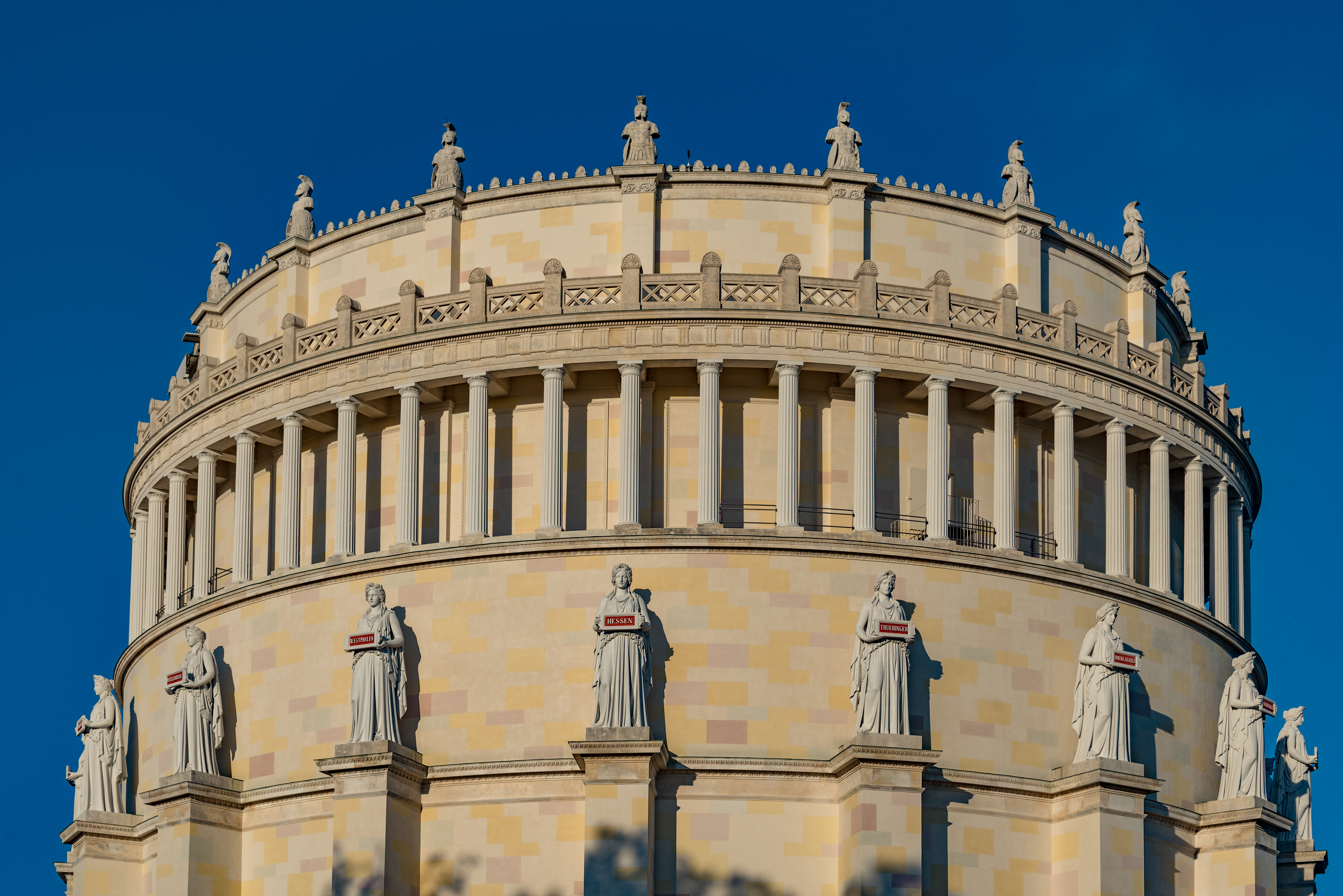 Kelheim, Befreiungshalle